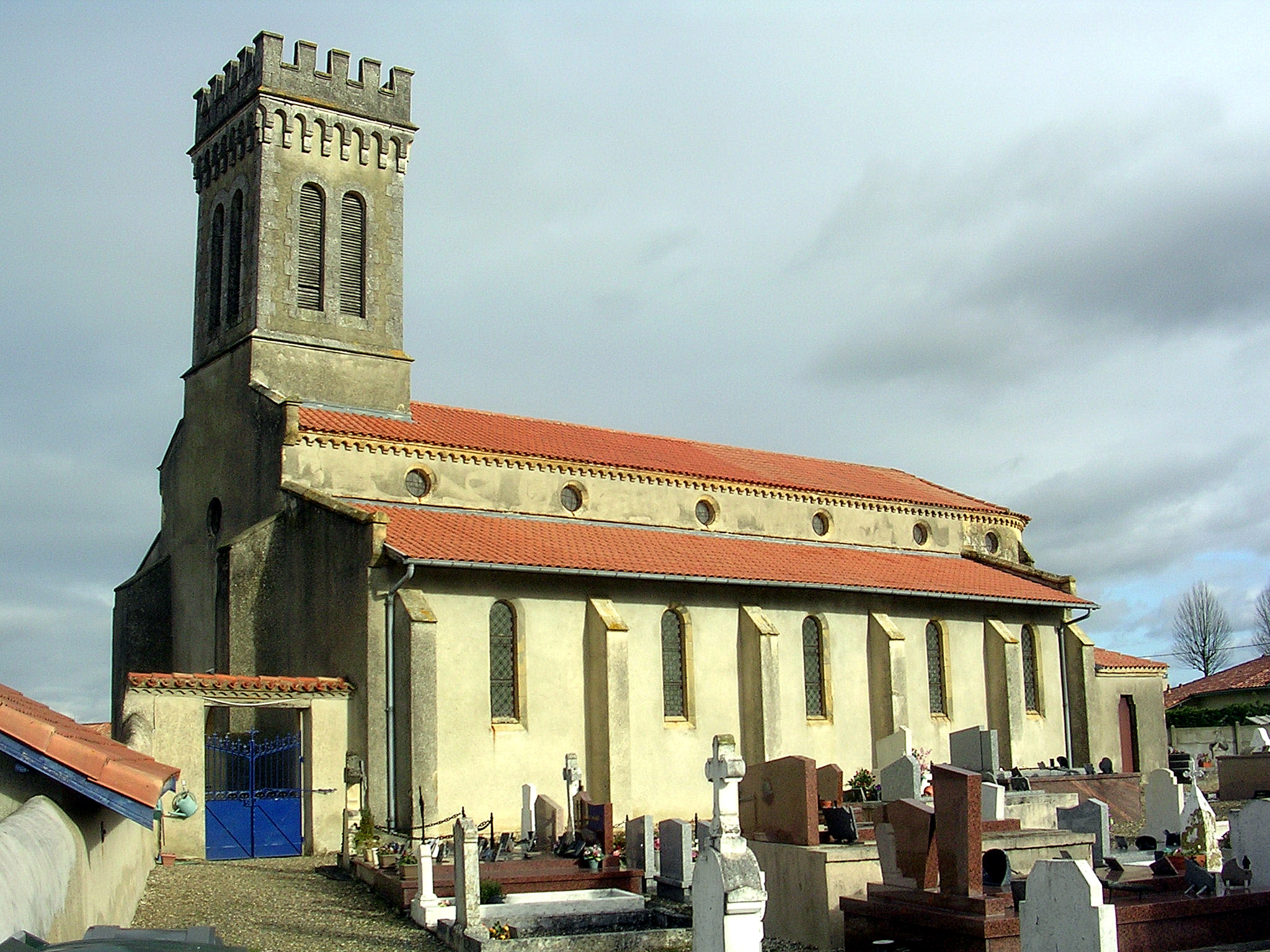 Eglise Notre-Dame d'Aubagnan (Landes, France)